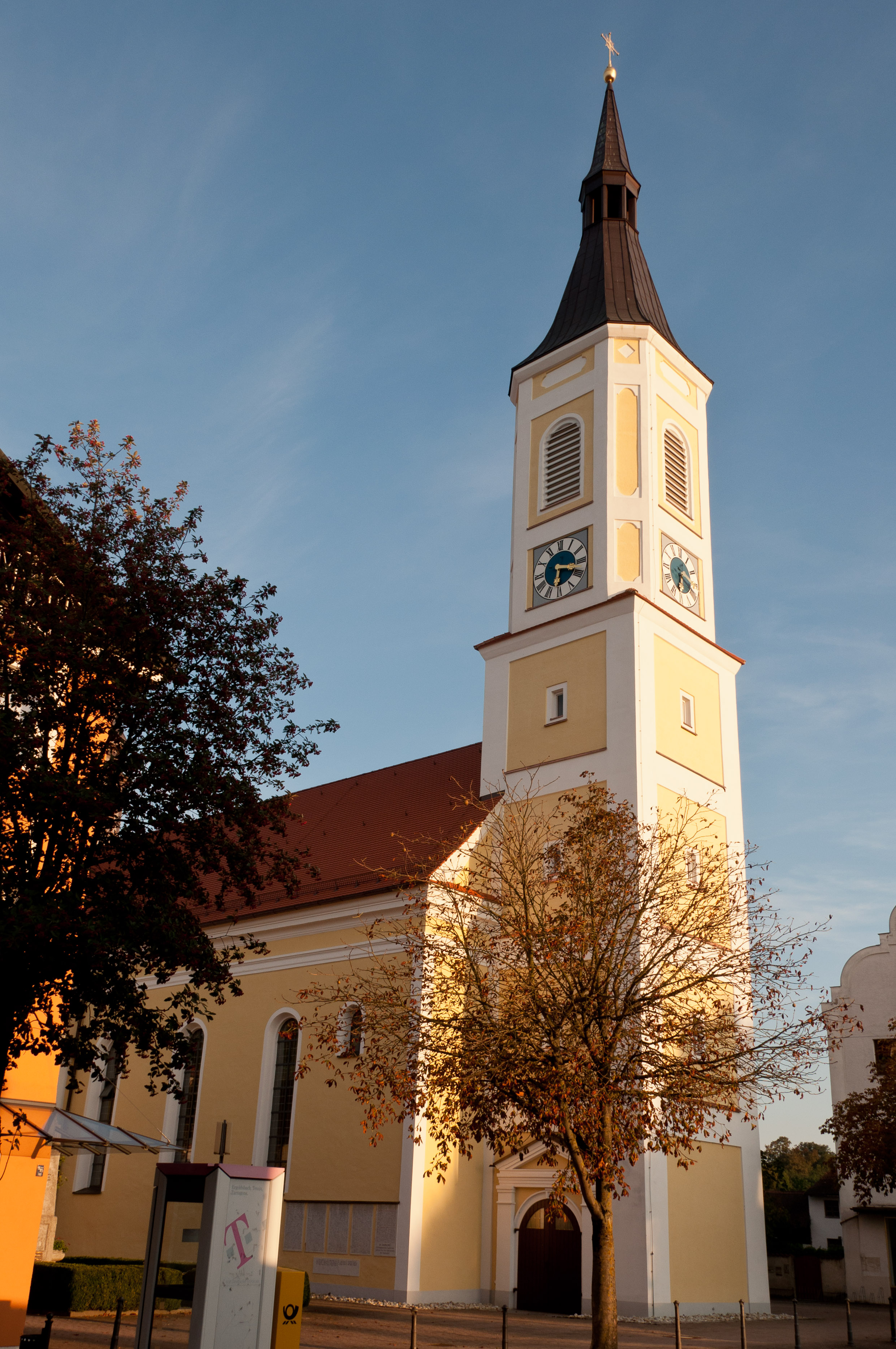 Ergoldsbach, Hauptstraße 018; Gebäudeaussenansicht, D-2-74-127-7, Denkmal Pfarrkirche St. Peter und Paul